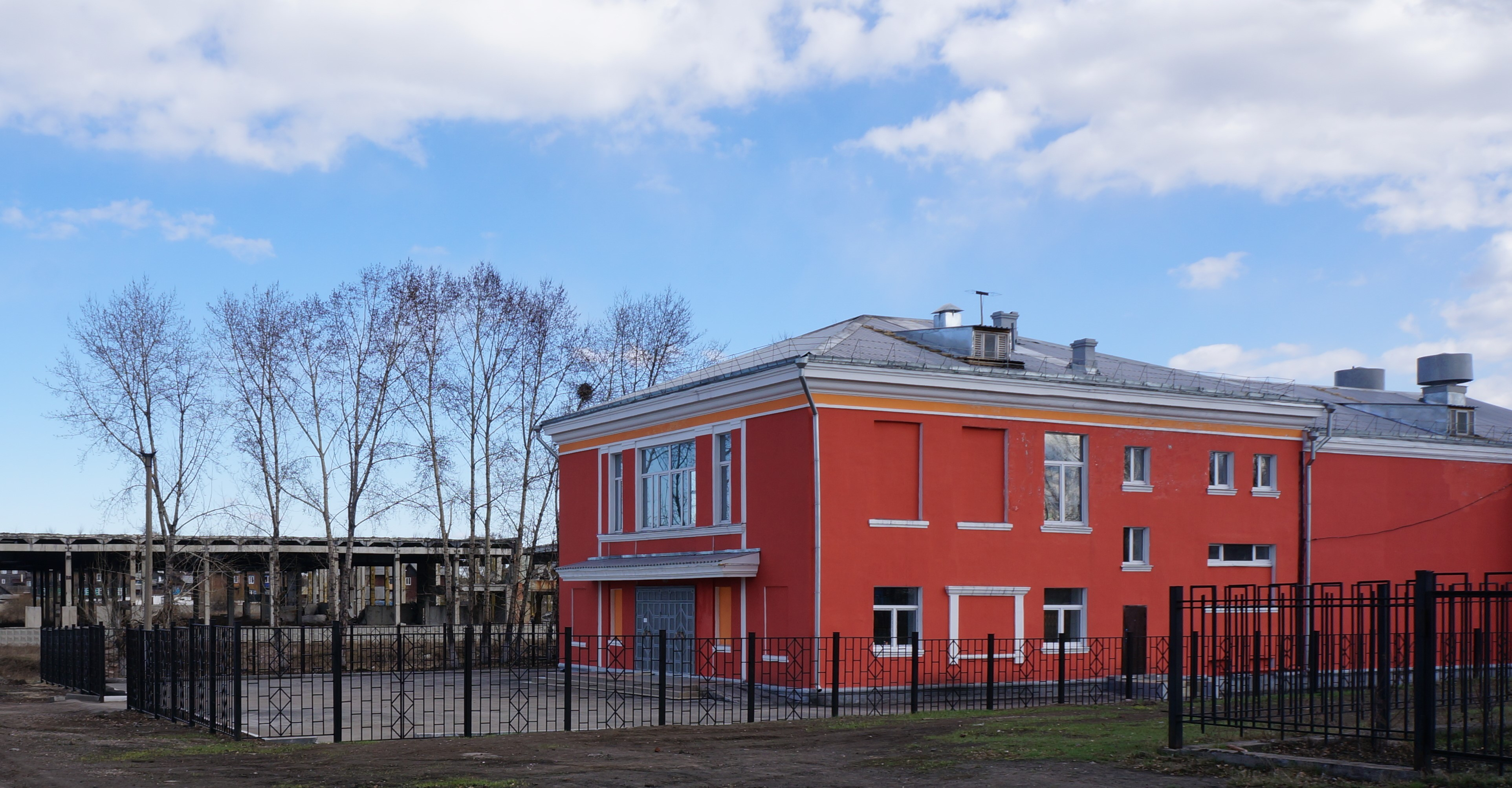 Отремонтированное здание бывшего кинотеатра "Шахтёр" на Шадринке город Черемхово Иркутской области. Фото сделано для сравнения изменений за последние 10 лет для сайта shadrinka.ru